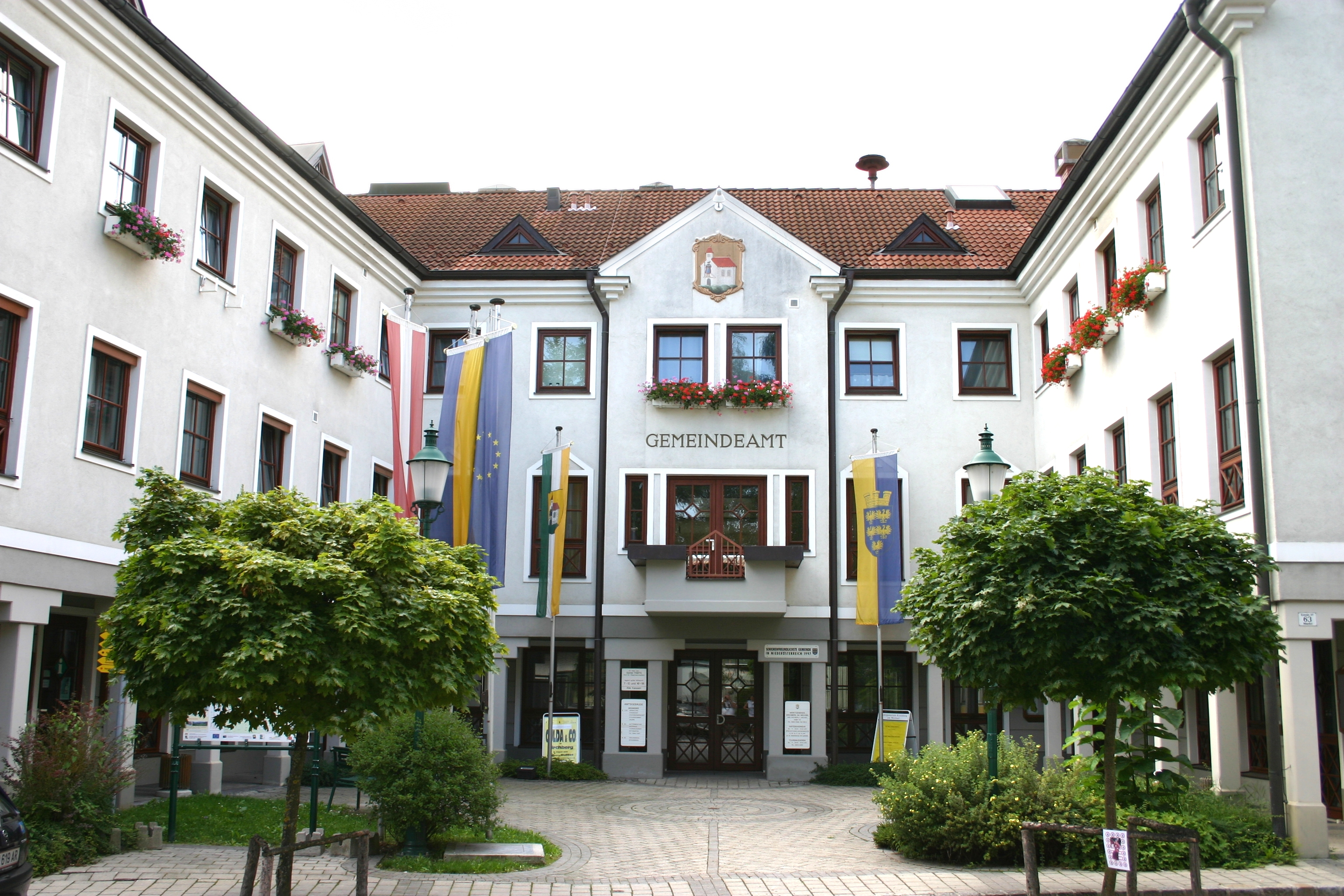 Kirchberg am Wechsel Gemeindeamt